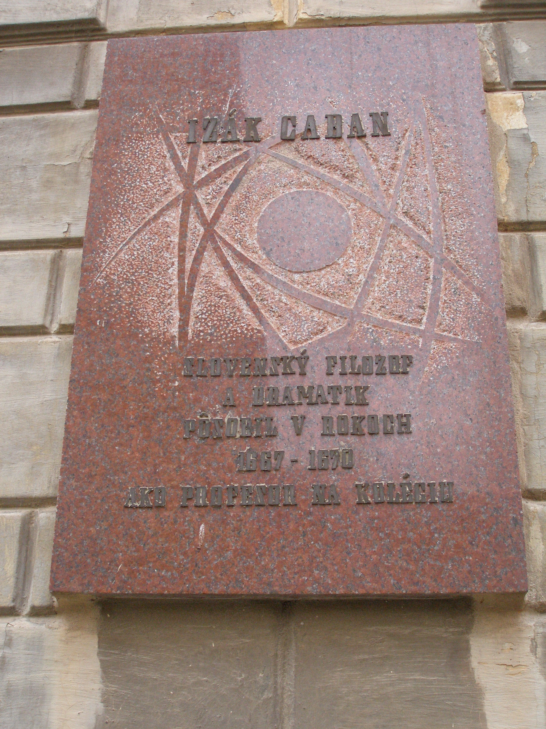 Mesto Prešov pamätihodnosti. Izák Caban